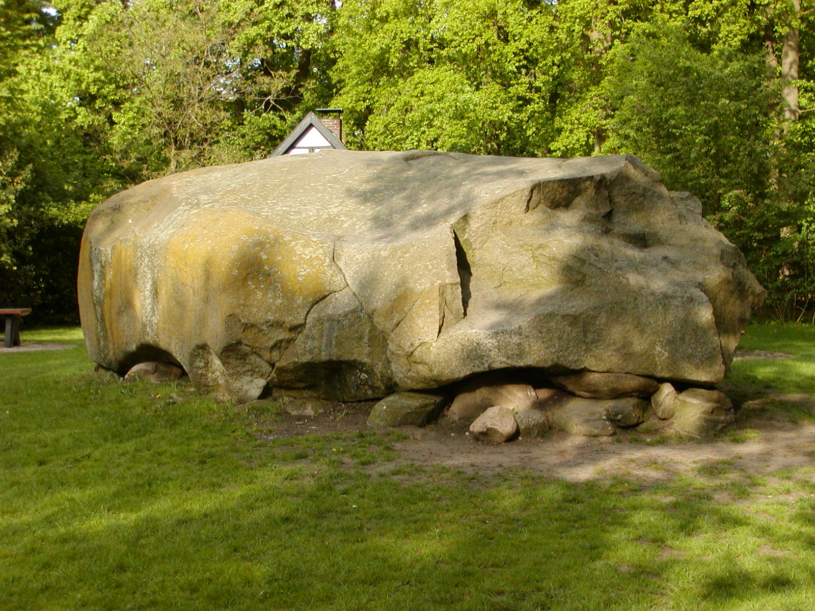 Großer Stein in Rahden-Tonnenheide. Dieser Findling ist der größte landliegende Findling Norddeutschlands.